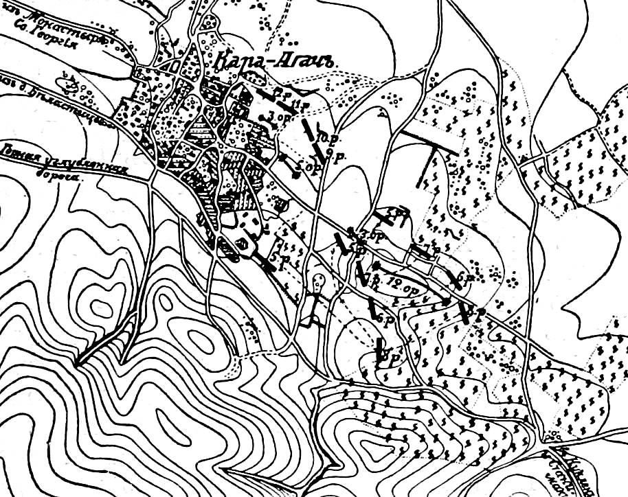 Это изображение было использовано для иллюстрирования статьи «Кара-Агач» (ныне Брестник) опубликованной в двенадцатом томе «Военной энциклопедии», который был издан книгоиздательским товариществом И. Д. Сытина в 1913 году в столице Российской империи городе Санкт-Петербурге. Подробное описание к этой картинке можно прочесть в указанной статье.